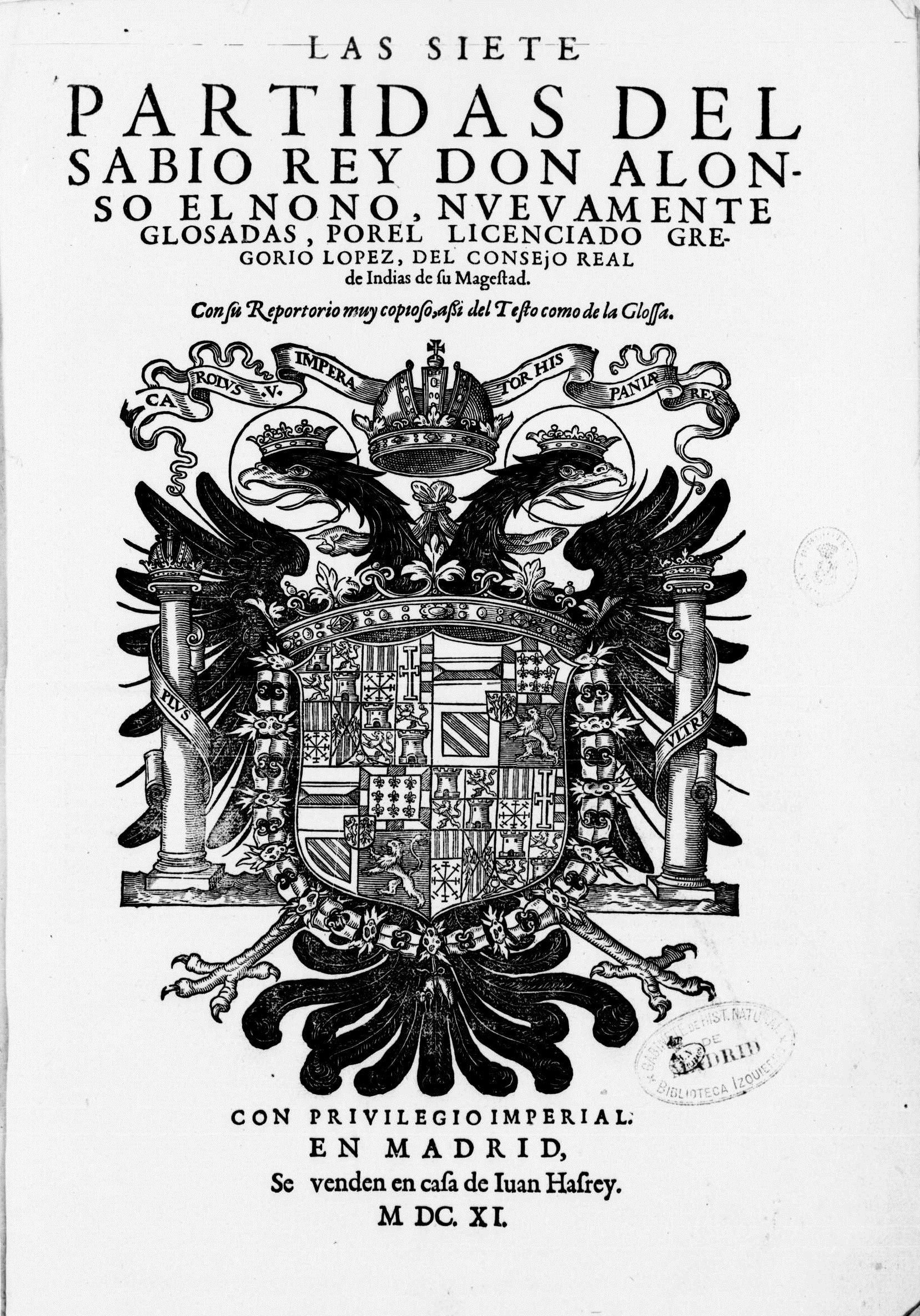 Frontespizio